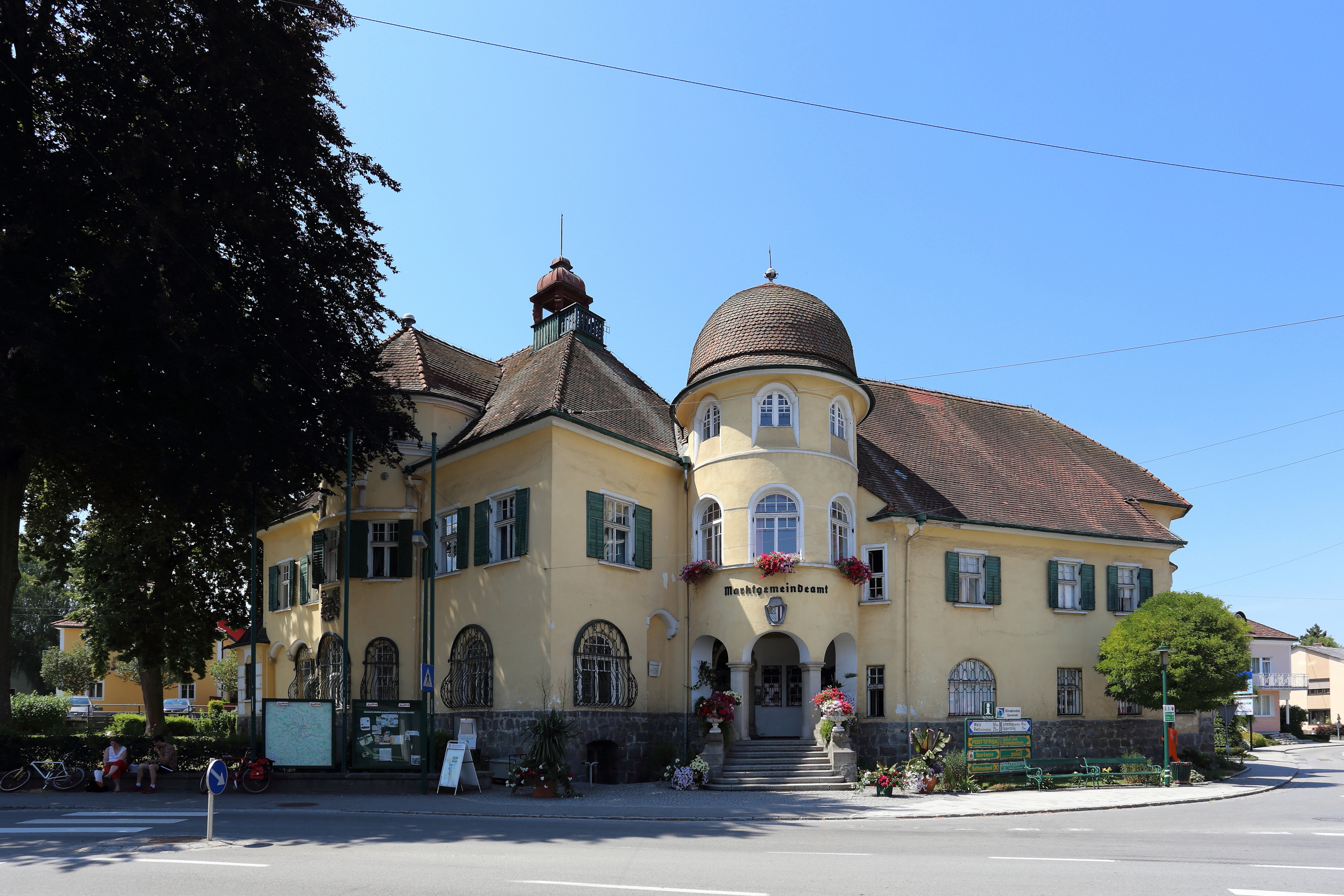 Das Gemeindeamt bzw. die Bösbauervilla in der oberösterreichischen Marktgemeinde Andorf.